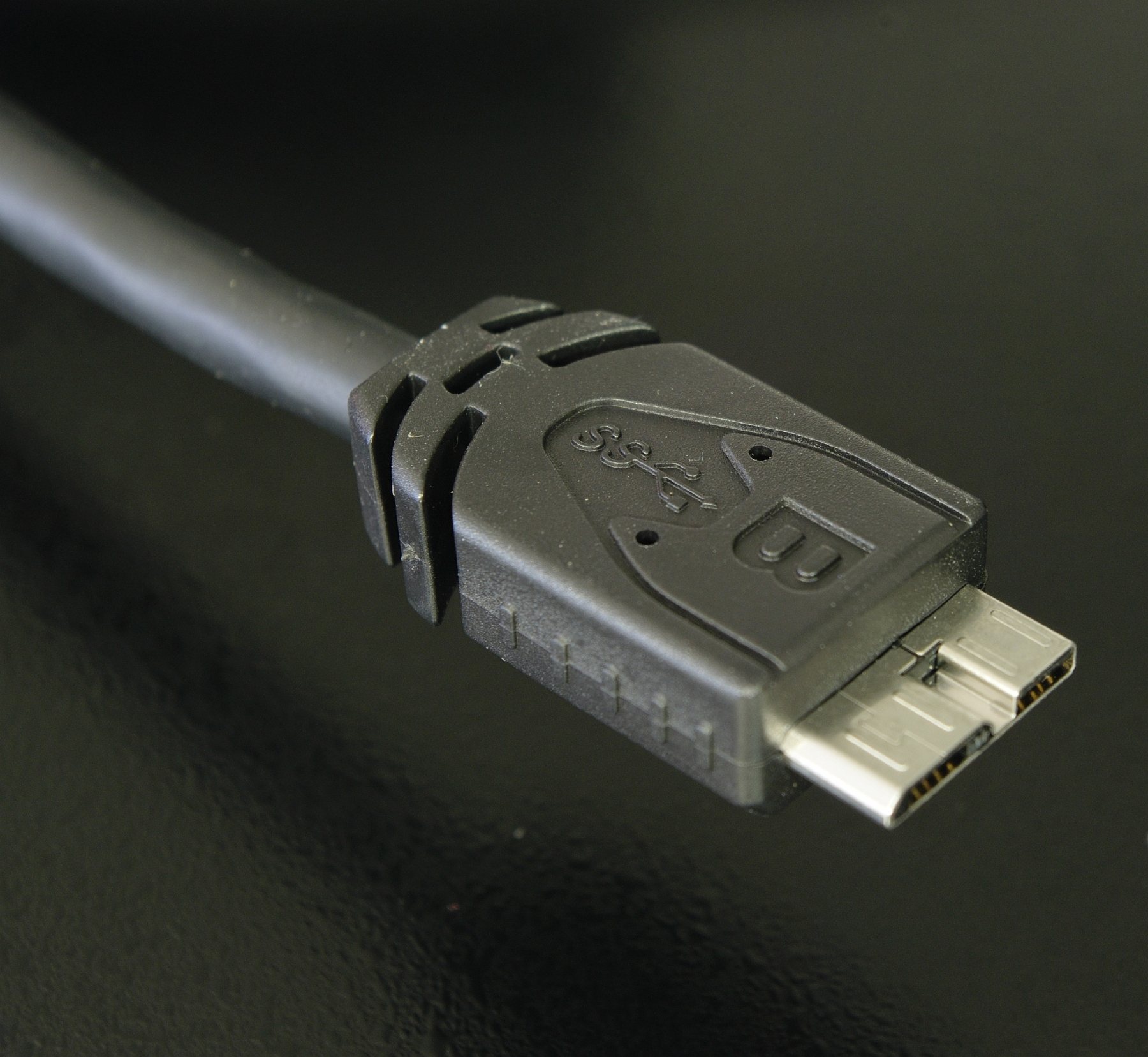 Steckverbindung USB 3.0